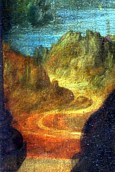 Mona Lisa